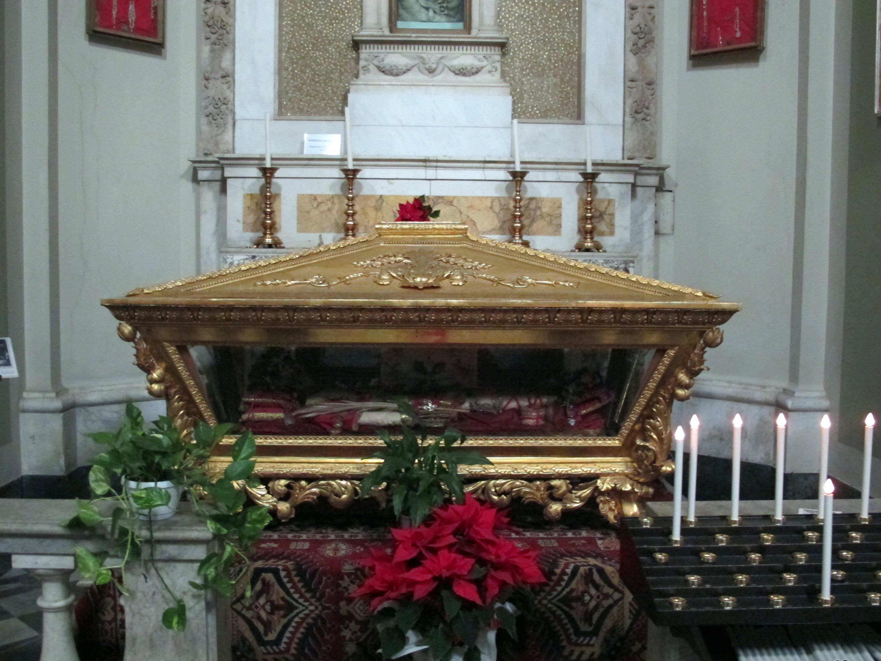 Fucecchio, collegiata di san giovanni, interno 08 reliquiario di san candido martire